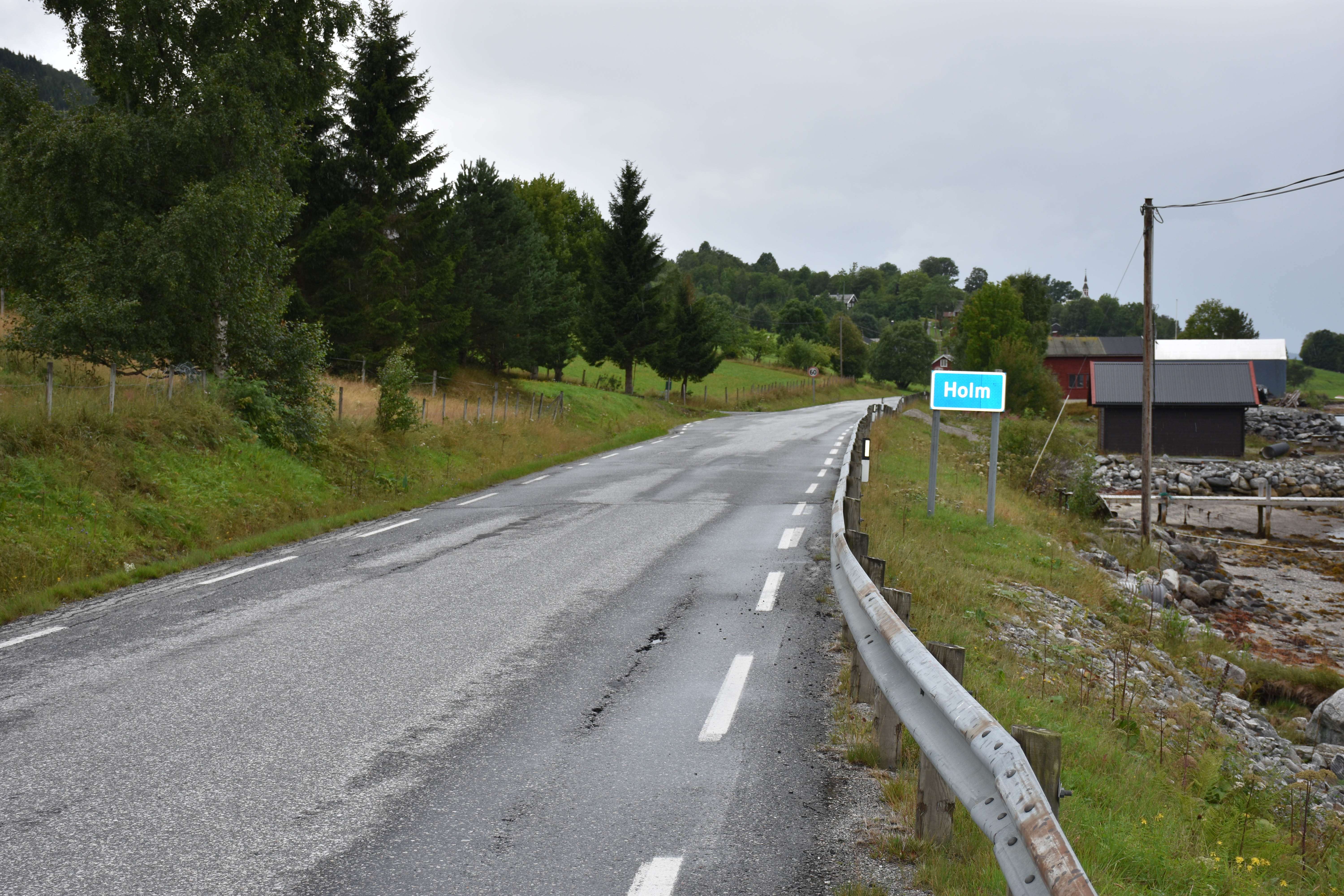 Langfjordsstranda (fylkesvei 660) ved Holm i Rauma